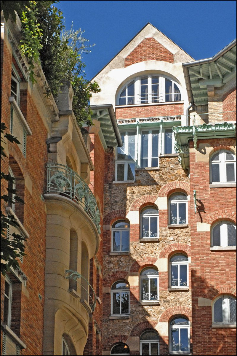 La cour intérieure du Castel Béranger, on peut y observer la variété des matériaux utilisés : briques, meulières et pierres de taille et le travail spécifique effectué sur les parties hautes du bâtiment. Le Castel Béranger est un immeuble de rapport de trente-six appartements situé 14, rue La-Fontaine dans le 16e arrondissement de Paris. Il a été conçu par l'architecte Hector Guimard. Sa construction a lieu à partir de 1895 jusqu'en 1898. C'est un chef d'oeuvre d'art nouveau français. Summary Castel Béranger — Paris. Hector Guimard y applique un principe fondamental de l’Art nouveau : celui de l’unité complète de l’œuvre. Il est également, et comme à son habitude, l'auteur du second-œuvre et de la décoration intérieure (sols, menuiserie, serrurerie, vitrerie et vitrail, peinture, tapisserie et papier-peint) mais aussi du mobilier. On retrouve à l'extérieur plusieurs thèmes chers à l'auteur : le bow-window, la loggia, le balcon et la ferronnerie ouvragée. L’immeuble est primé au 1er concours de façades de la Ville de Paris en 1898, mais cette nomination est critiquée. extrait de Wikipedia.fr